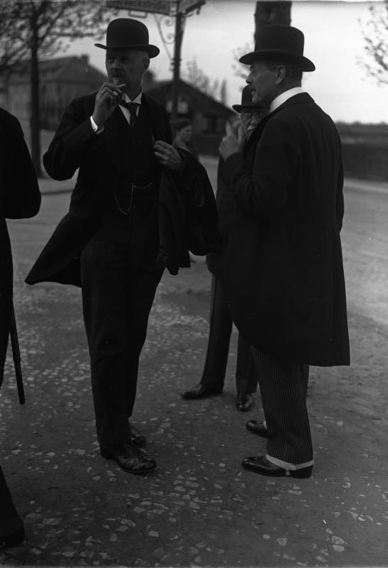 links Minister a.D. Dr. Sämisch rechts Dr. ing. Karl Friedrich von Siemens Vorsitzender des Aufsichtsrat der Siemens Halske A.-G. und der Siemens-Schuckert-Werke.